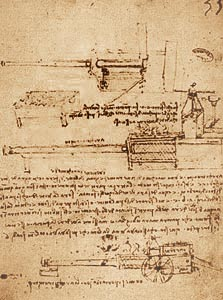 Пушка, стреляющая при помощи пара - ARCHITRONITO (рисунок Леонардо да Винчи)